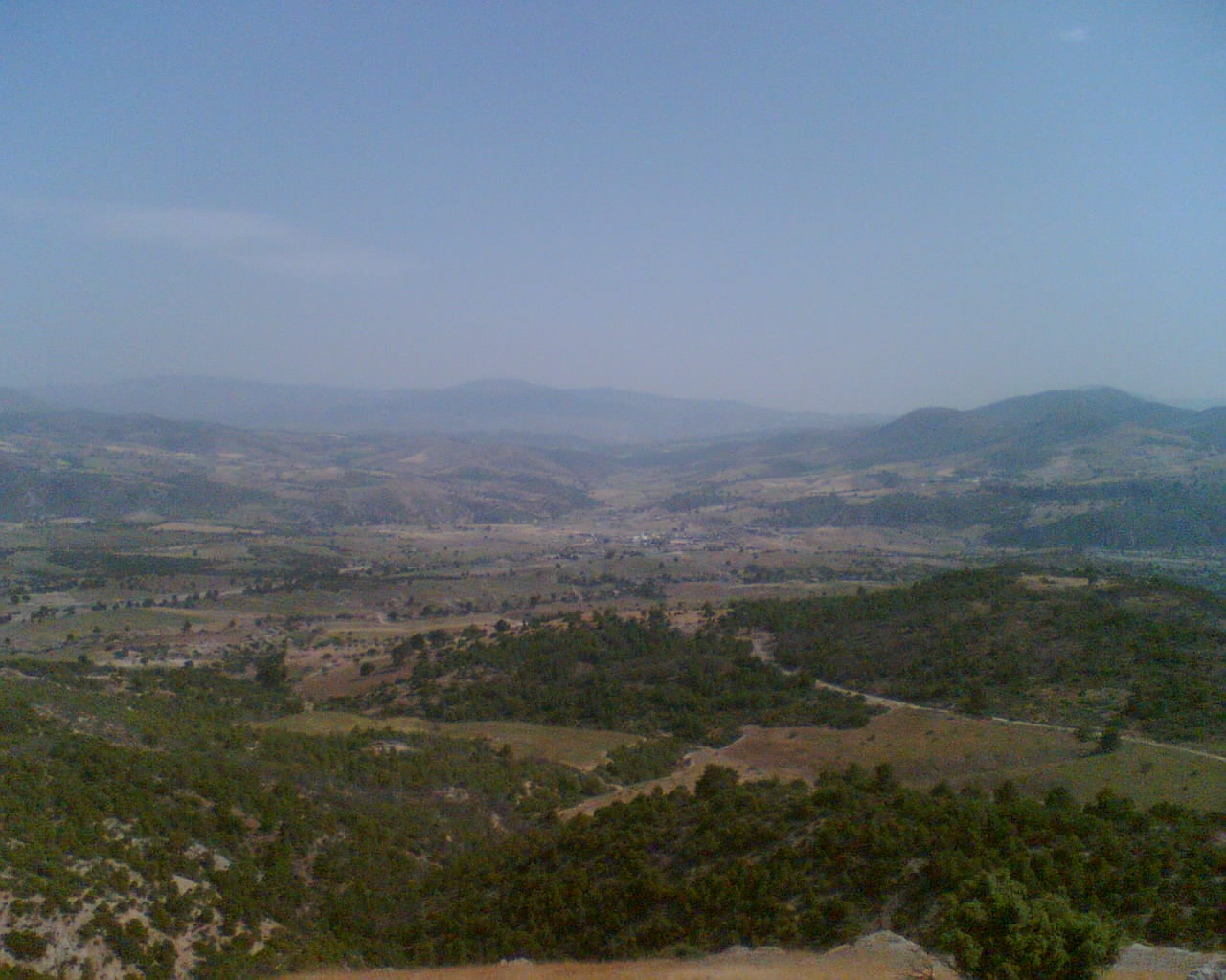 Vue sur la région de Assif Lekhmis, à partir d’un mont derrière le village de S’rour